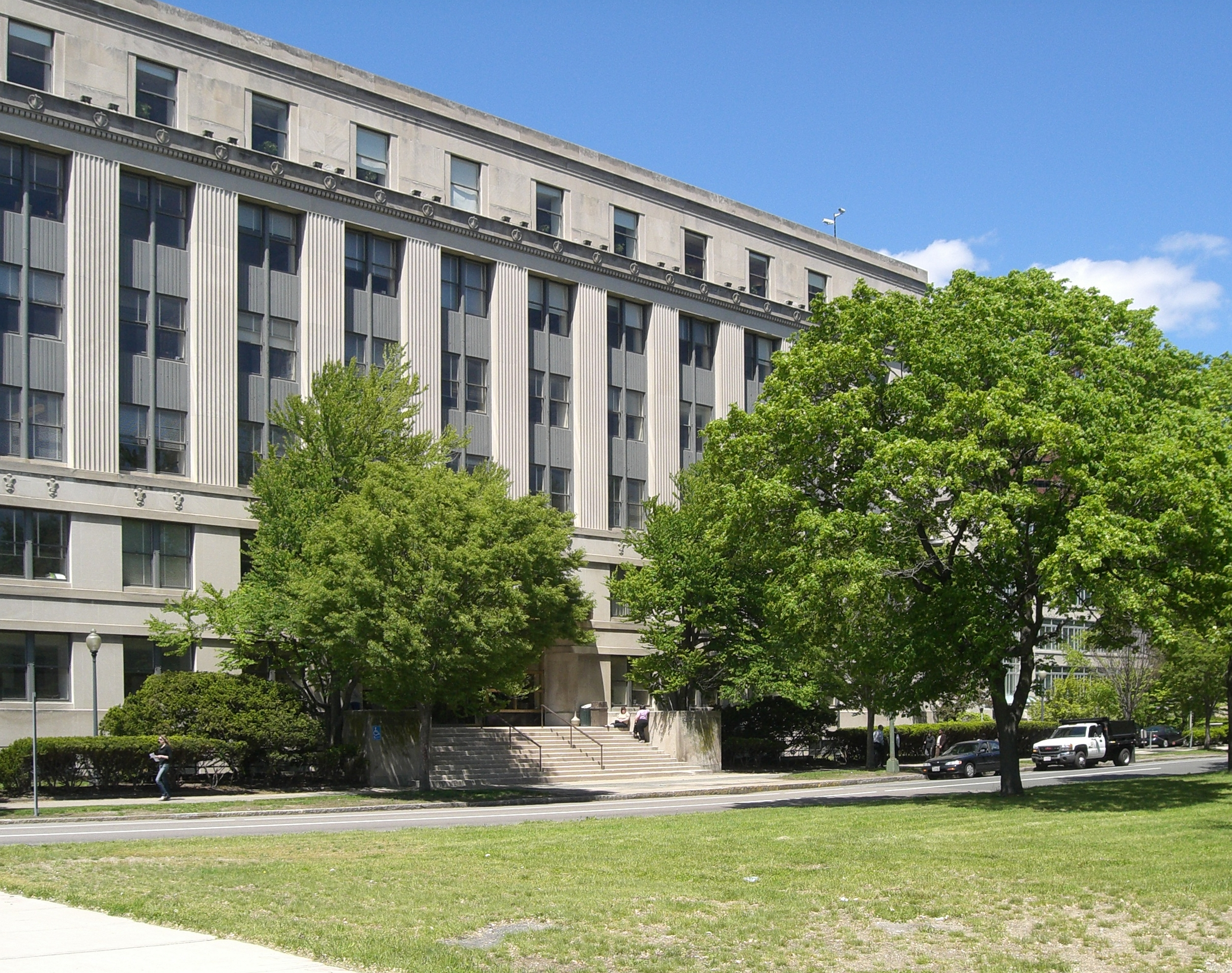 MIT Sloan, altes Hauptgebäude